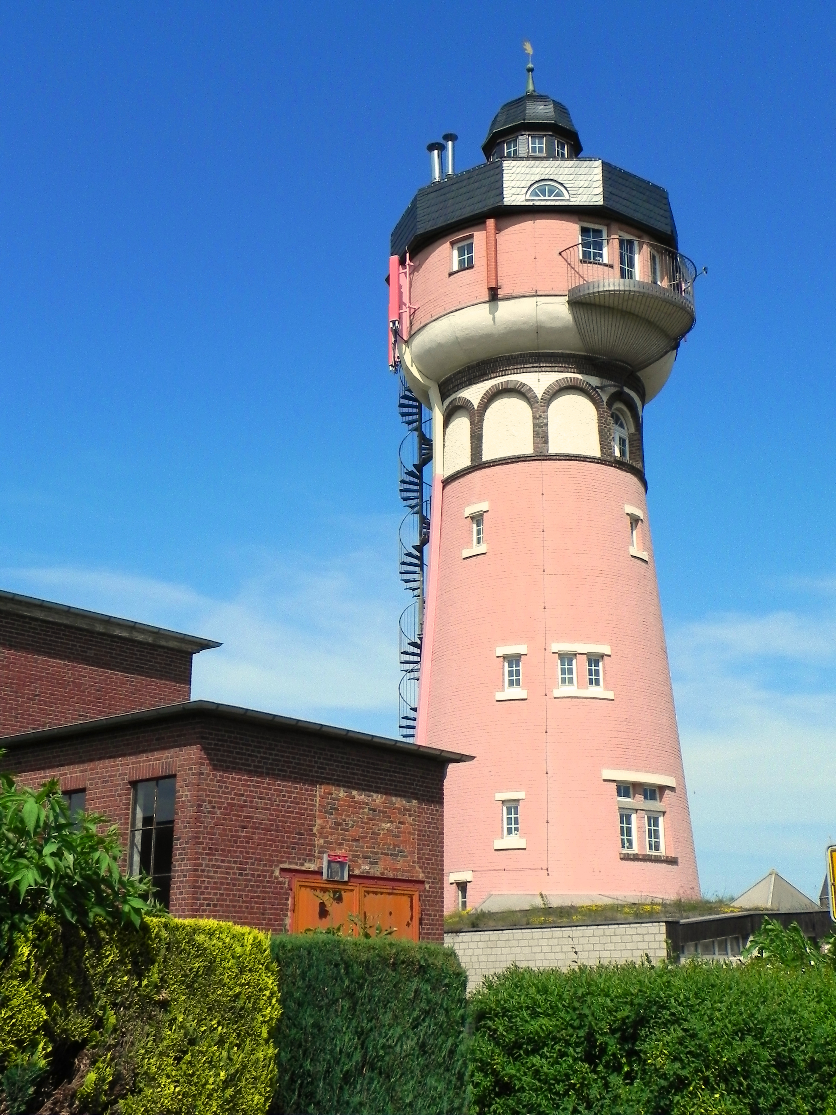 Wasserturm der Wasserwerke Wissersheim-Rath (Nordrhein-Westfalen) von 1908